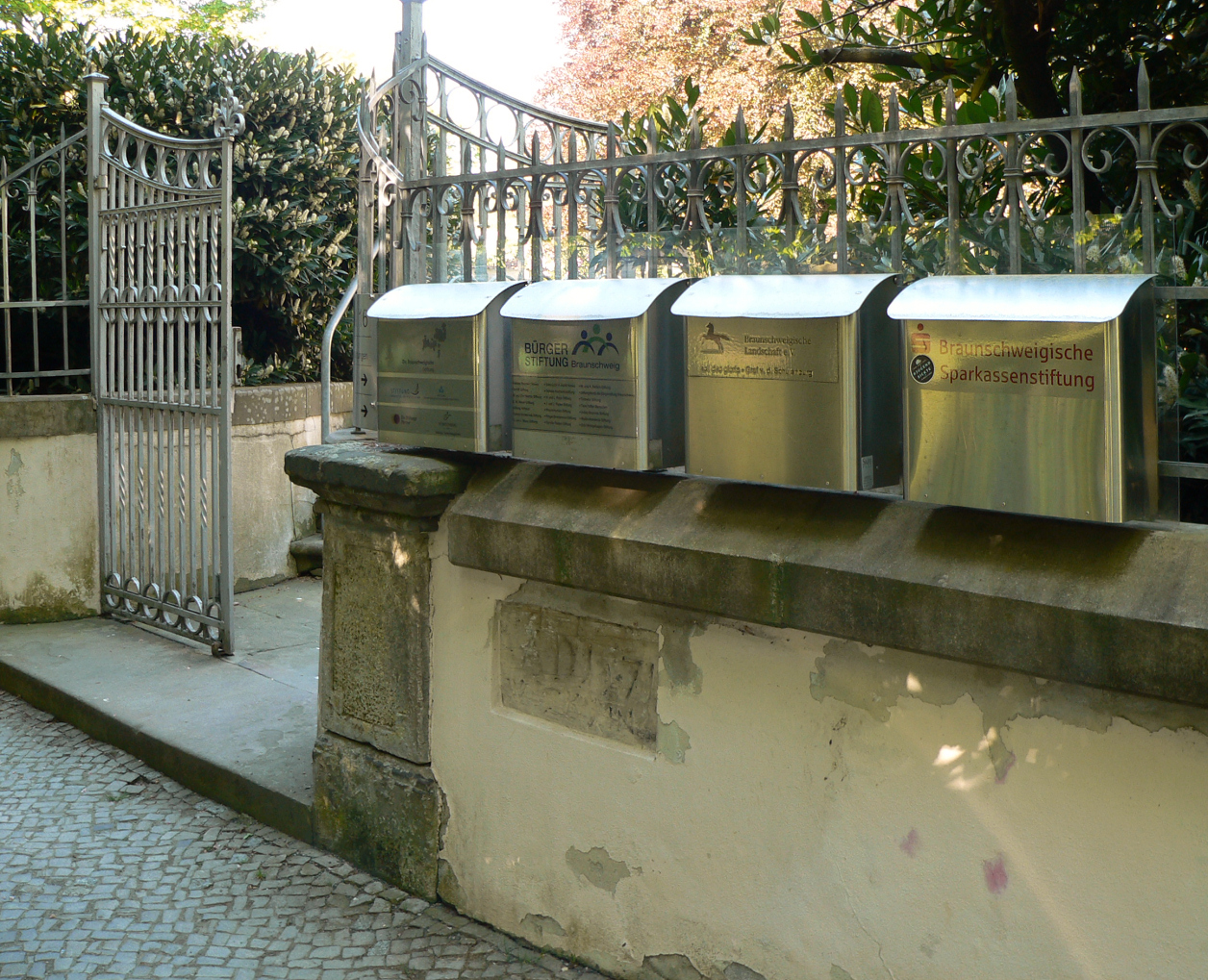 Haus der Braunschweigischen Stiftungen Briefkästen